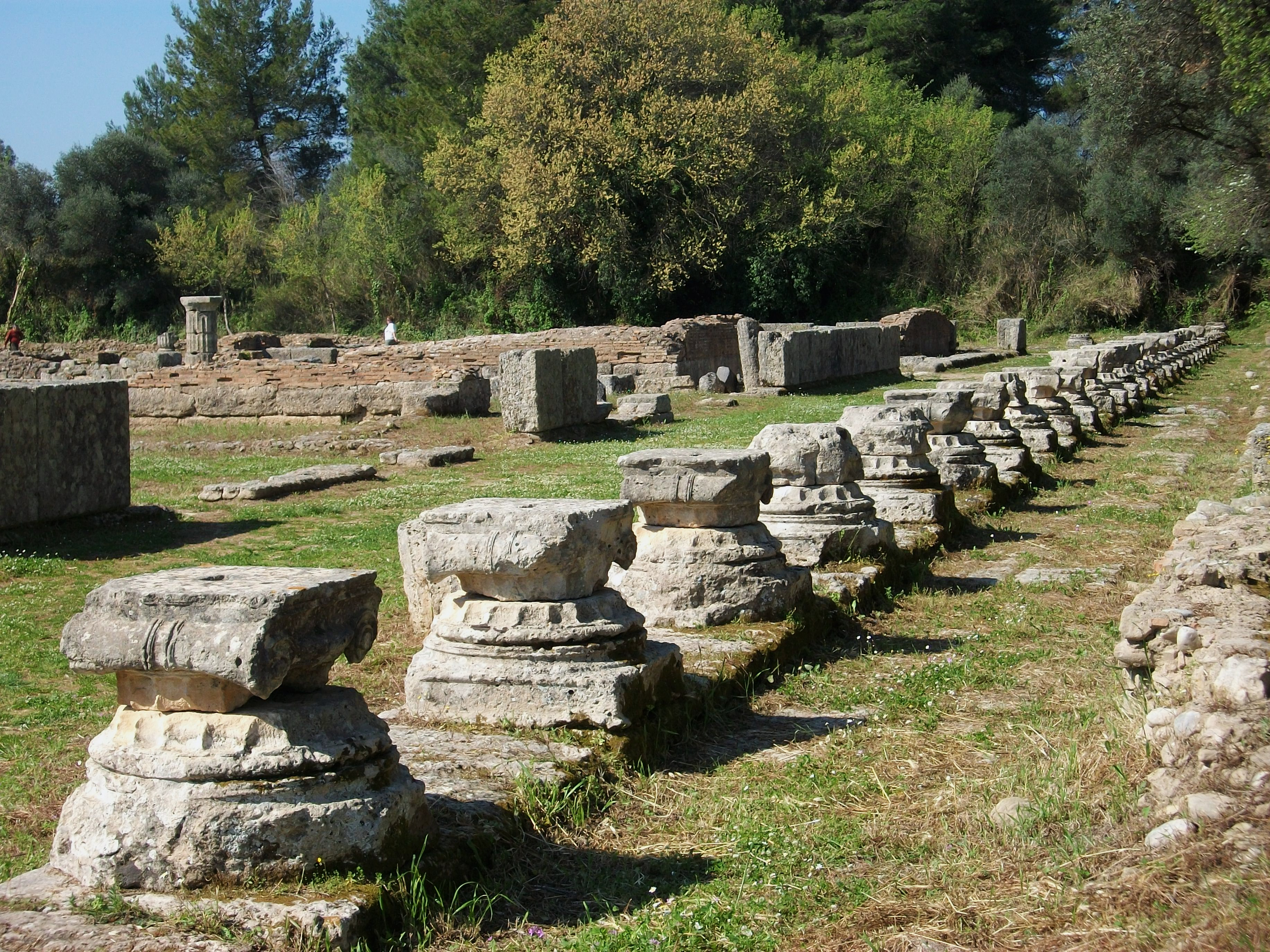 Leonidaion a Olímpia.